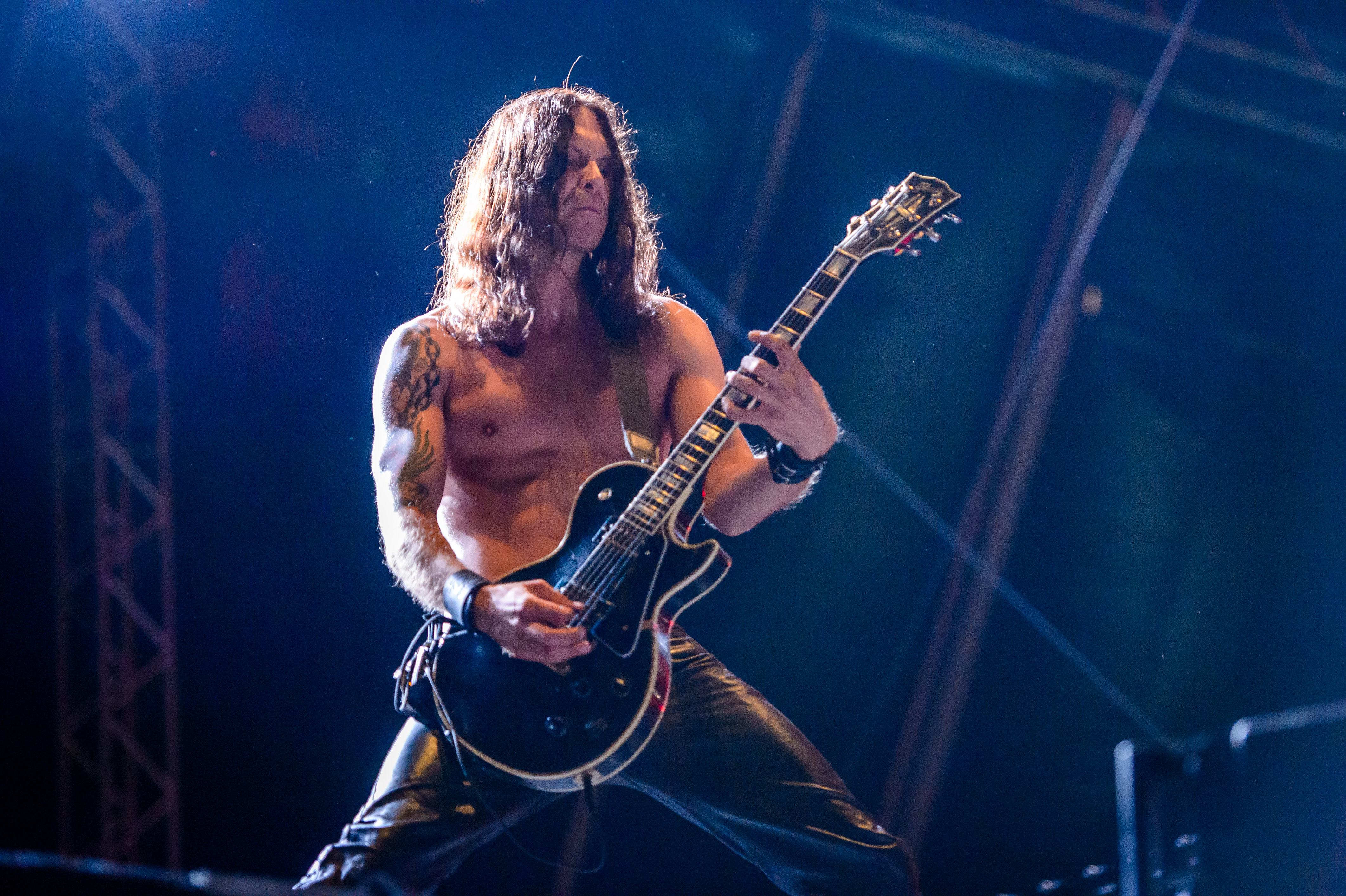 'RockHarz Open Air 2016; Ballenstedt': 'Enslaved'